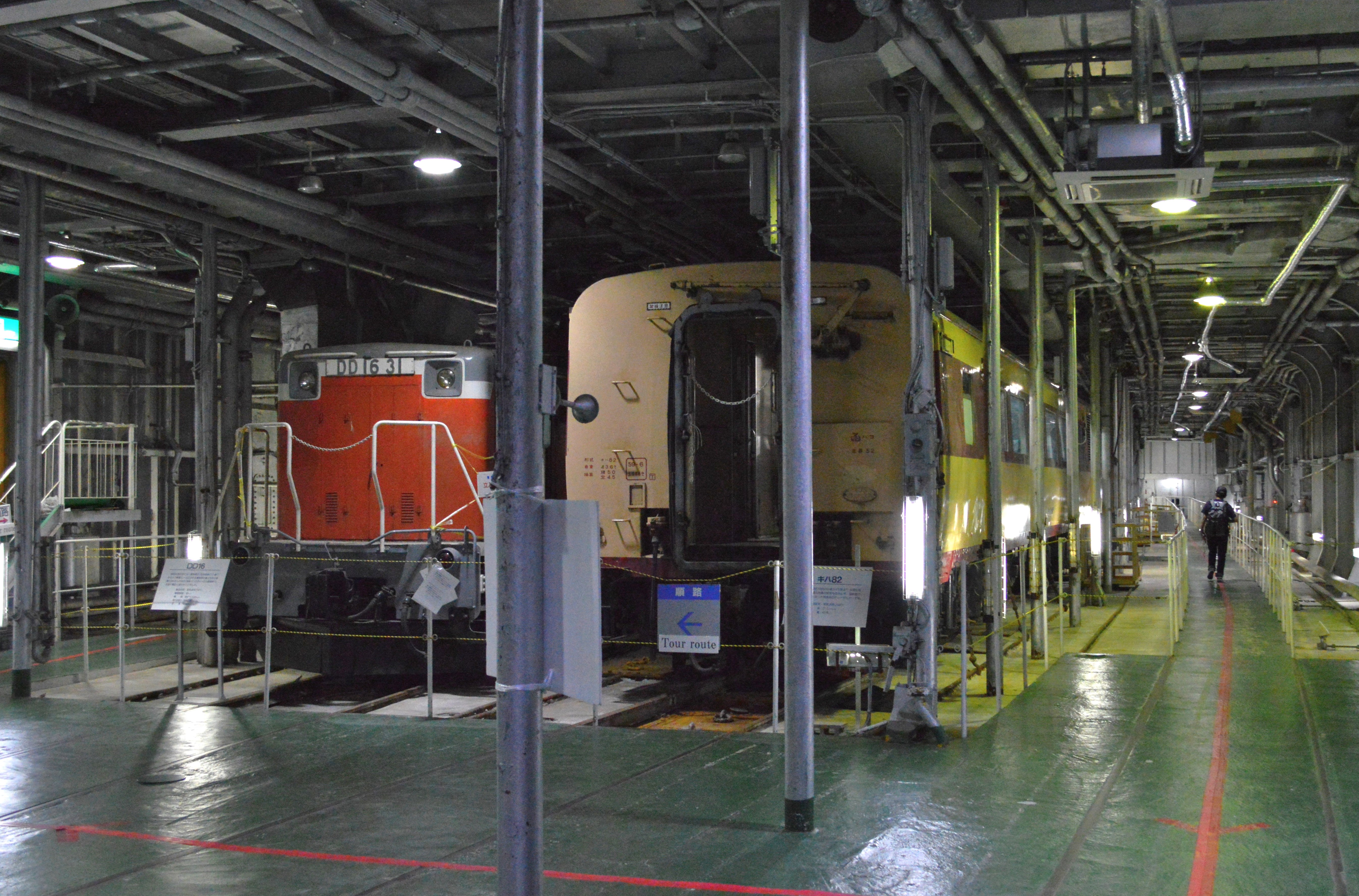 八甲田丸 船内の鉄道車両